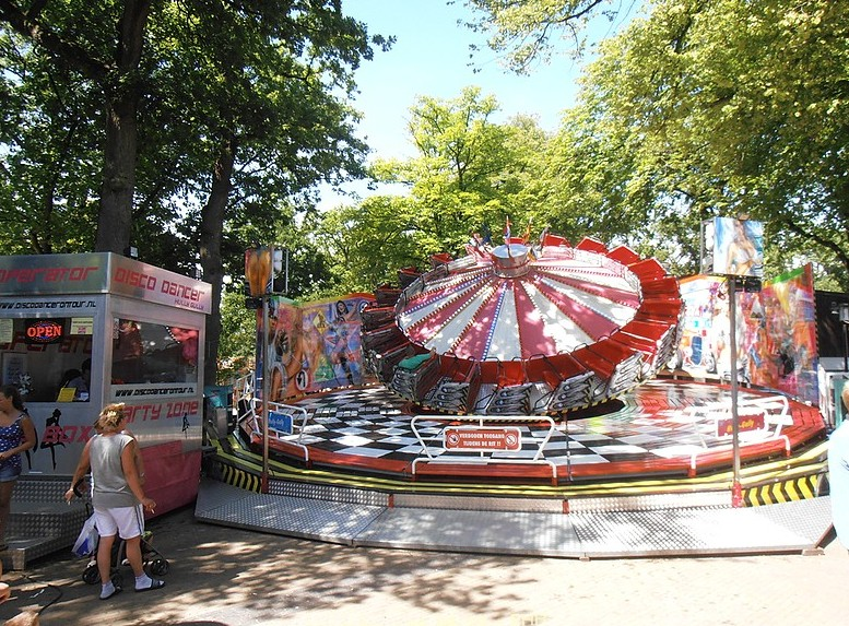 De Hully Gully van de Familie Boers op de zomerkermis in Appelscha 2013